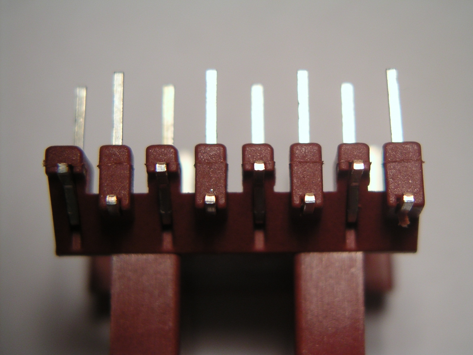 Spulenkörperflansch mit Stiften E20, zweireihig Bild selbst fotografiert, GNU FDL